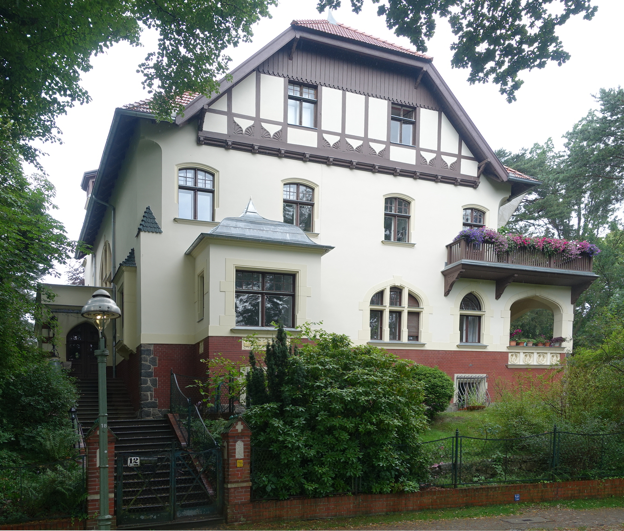 Wohnhaus